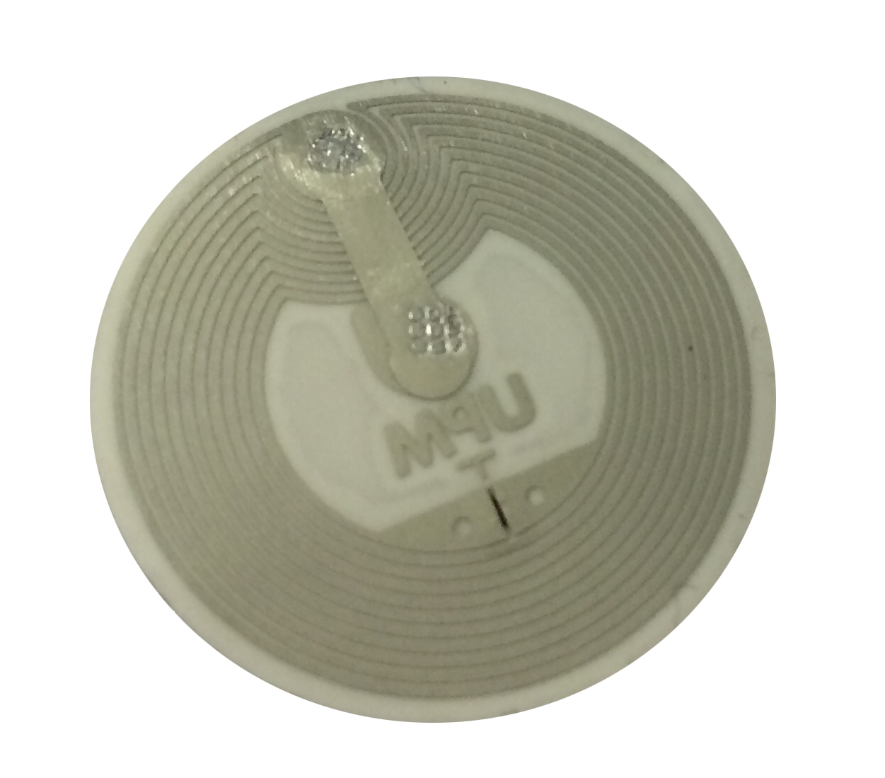 Dit is een NFC Tag ter grootte van een euro munt